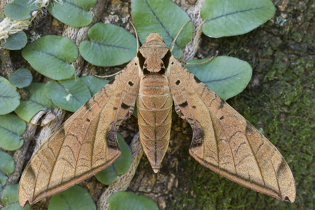 Local: Araçatuba/SP - Brasil Parque da Fazenda do Estado Bioma: Mata Atlântica Acessórios: Tripé + Trilho Foco Macro + Cabo Disparador Remoto + Rebatedor Circular